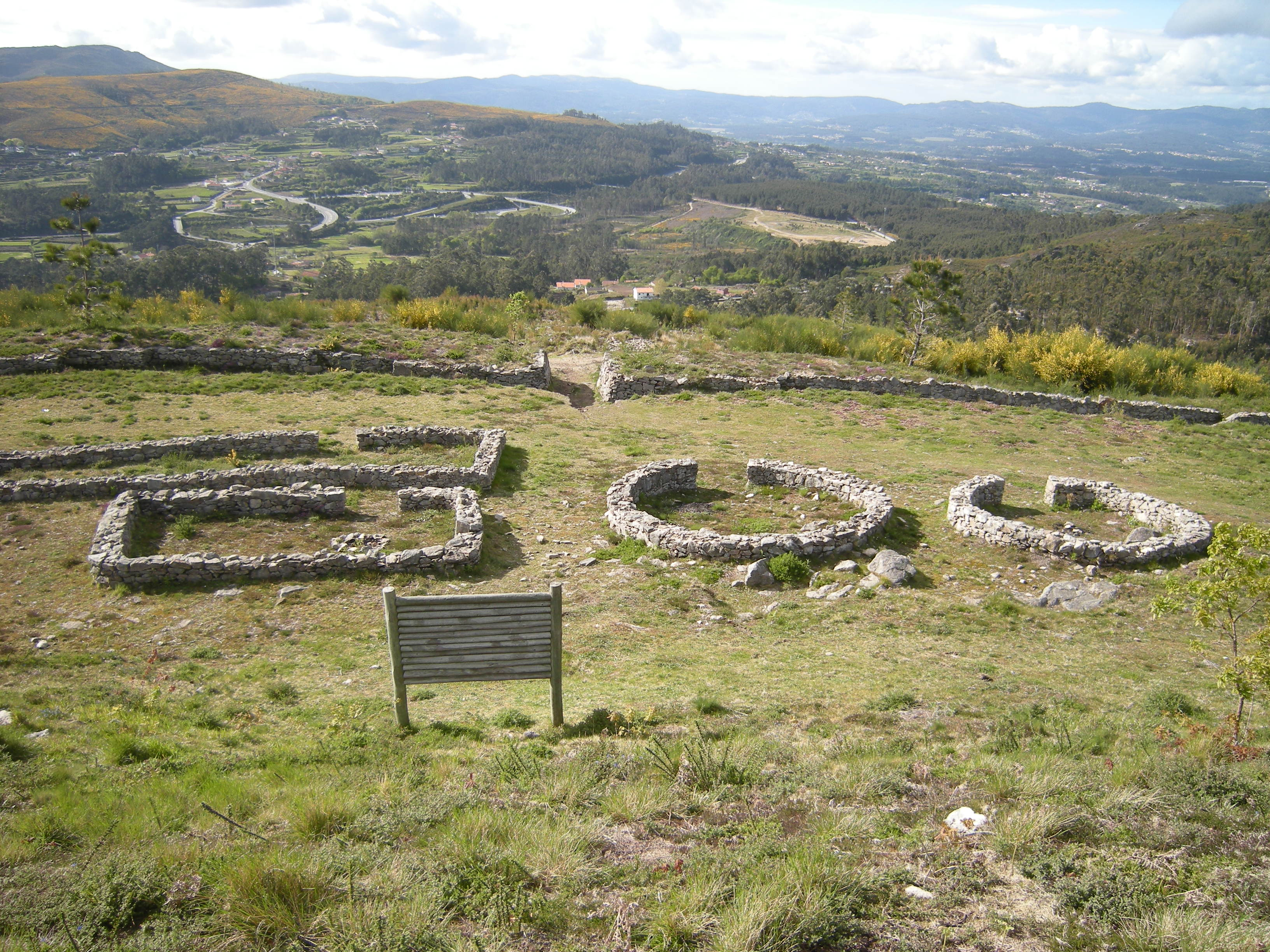 Povoado Fortificado de Cossourado - Paredes de Coura